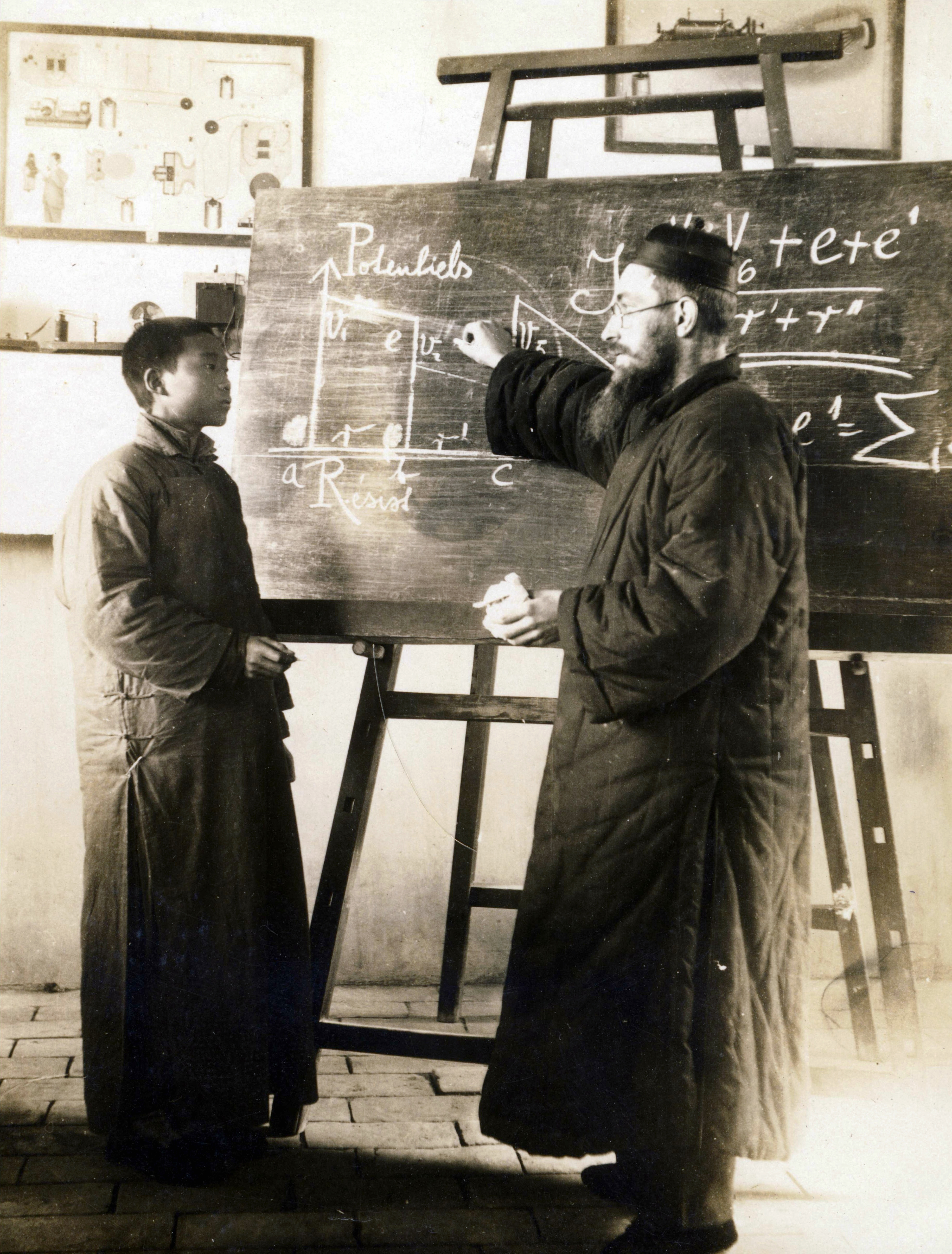 Litványi (később Lidoni) György jezsuita szerzetes a magyar jezsuita misszió iskolájában. Location: China, Daming Tags: school desk, blackboard, teacher, student, missionary Title: Litványi (később Lidoni) György jezsuita szerzetes a magyar jezsuita misszió iskolájában.